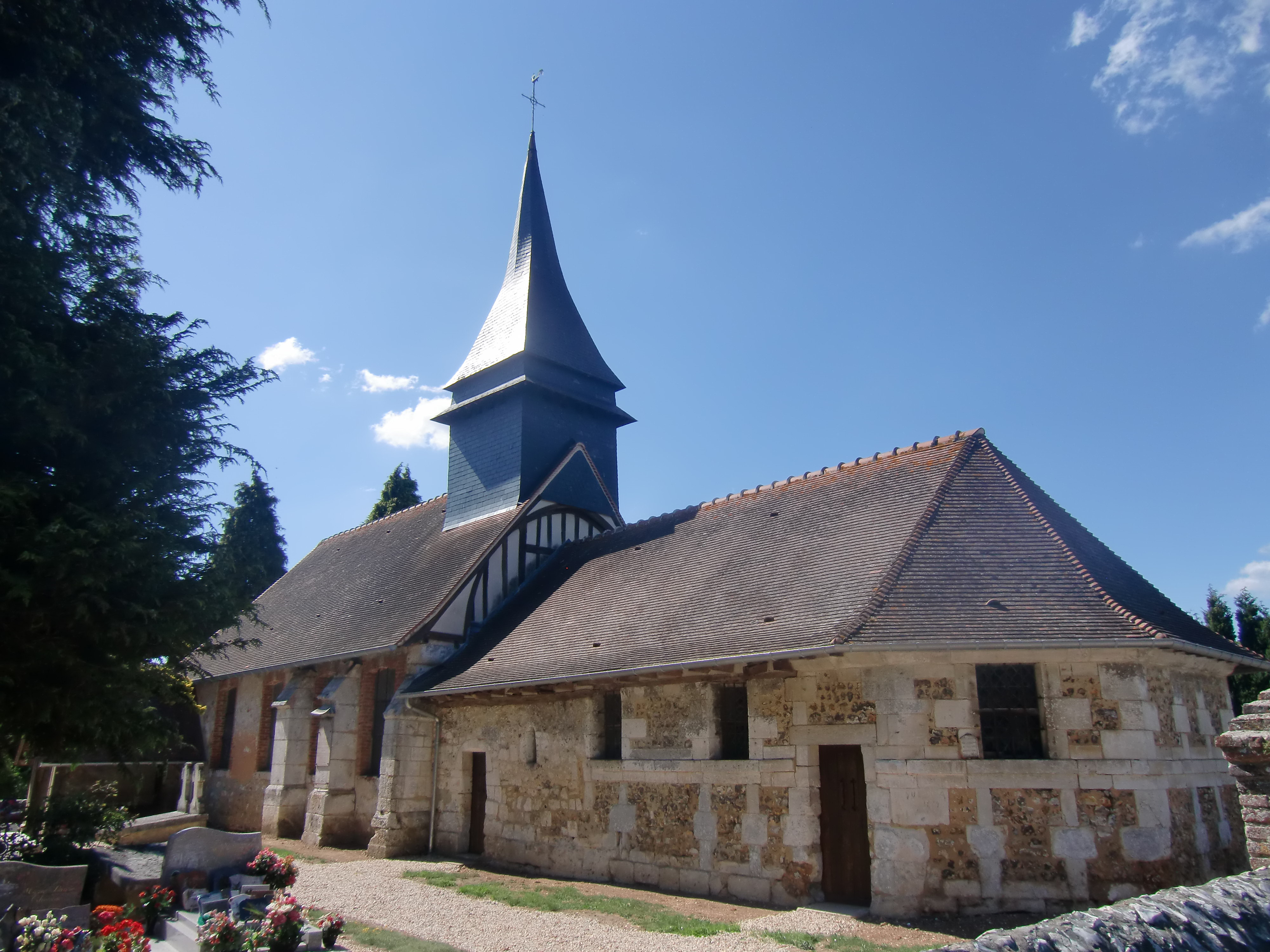 Eglise Saint Lubin à Catelon (Flancourt-Catelon, Eure, Normandie, France)